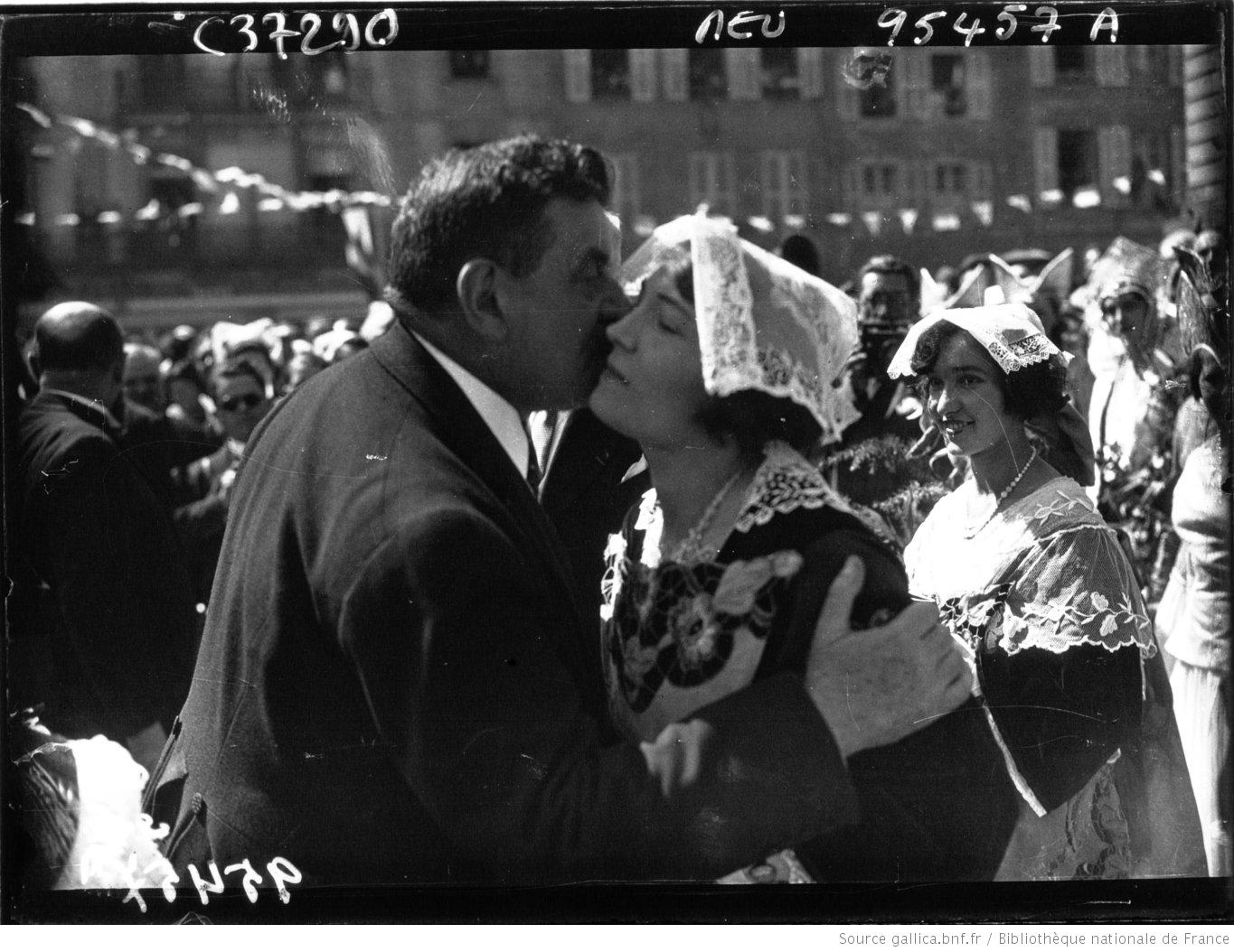 Visite du président de la République Edouard Herriot en août 1932 pour célébrer le 400ème anniversaire de l'union de la Bretagne à la France.